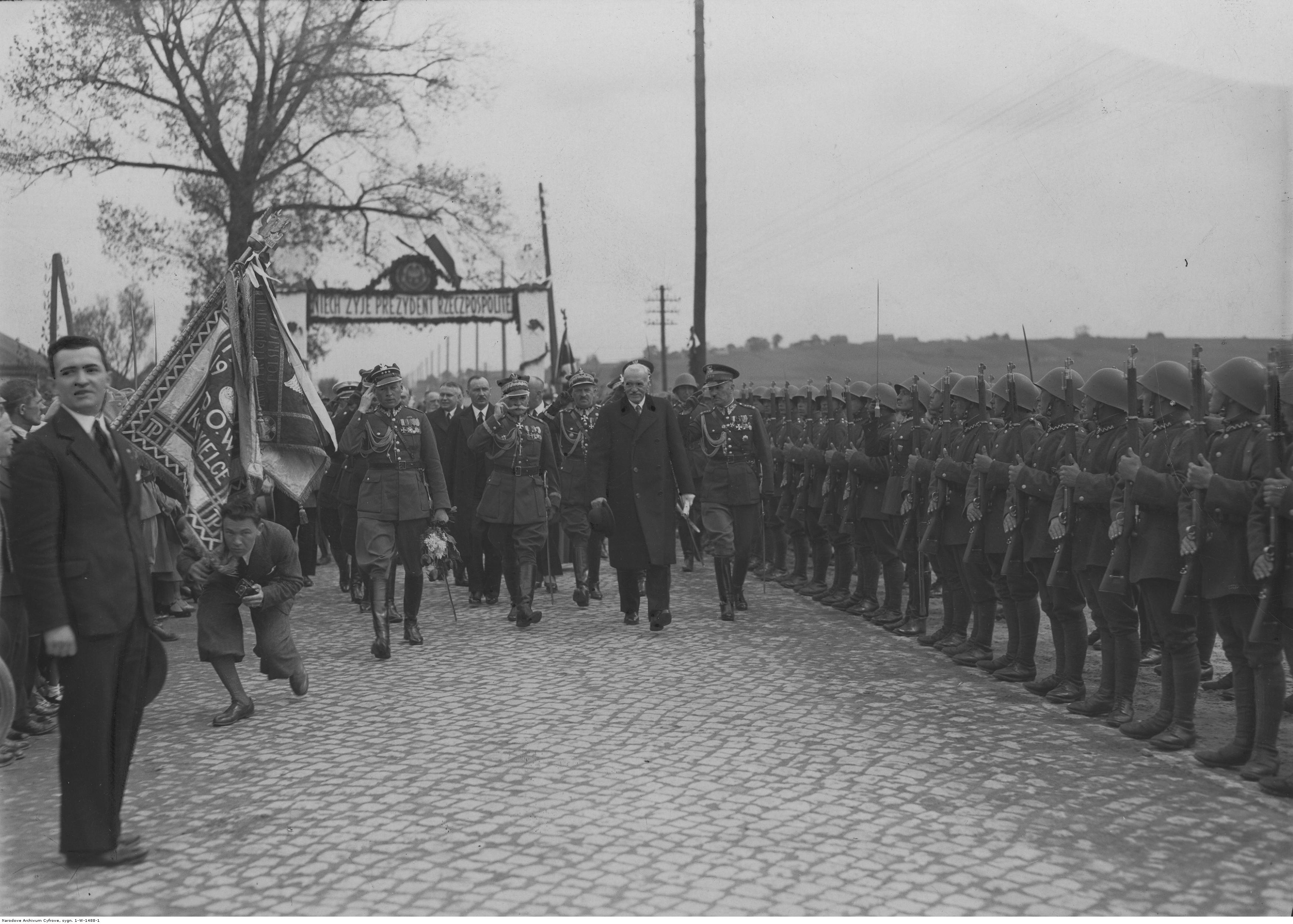 XV - lecie 2 Pułku Artylerii Lekkiej w Kielcach; 12 czerwiec 1933 r. Prezydent RP Ignacy Mościcki (drugi z prawej) przechodzi przed frontem żołnierzy, witany przez delegacje wojska i ludność cywilną na granicy miasta. Obok Prezydenta idą: adiutant prezydenta kpt. Zygmunt Gużewski (na lewo od gen. Osińskiego), gen. dyw. Aleksander Osiński (na lewo od Prezydenta), płk Jan Głogowski (na prawo od Prezydenta), gen. Janusz Głuchowski (na lewo za Prezydentem). Koncern Ilustrowany Kurier Codzienny - Archiwum Ilustracji. Sygnatura: 1-W-1488-1